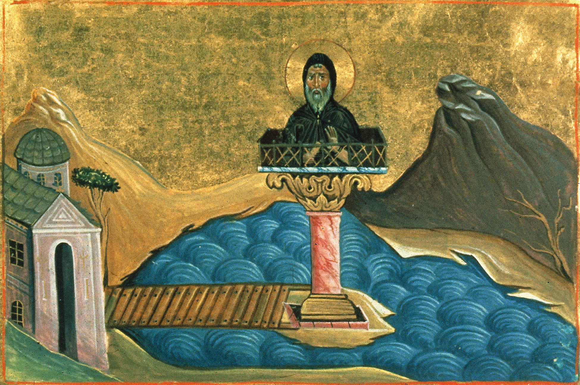 Лука Столпник, Халкидонский, иеромонах Image should be mirrored!!!